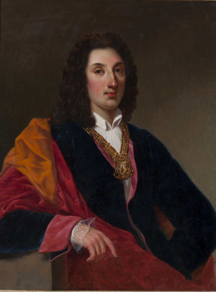 Ritratto del conte luigi tommaso di savoia